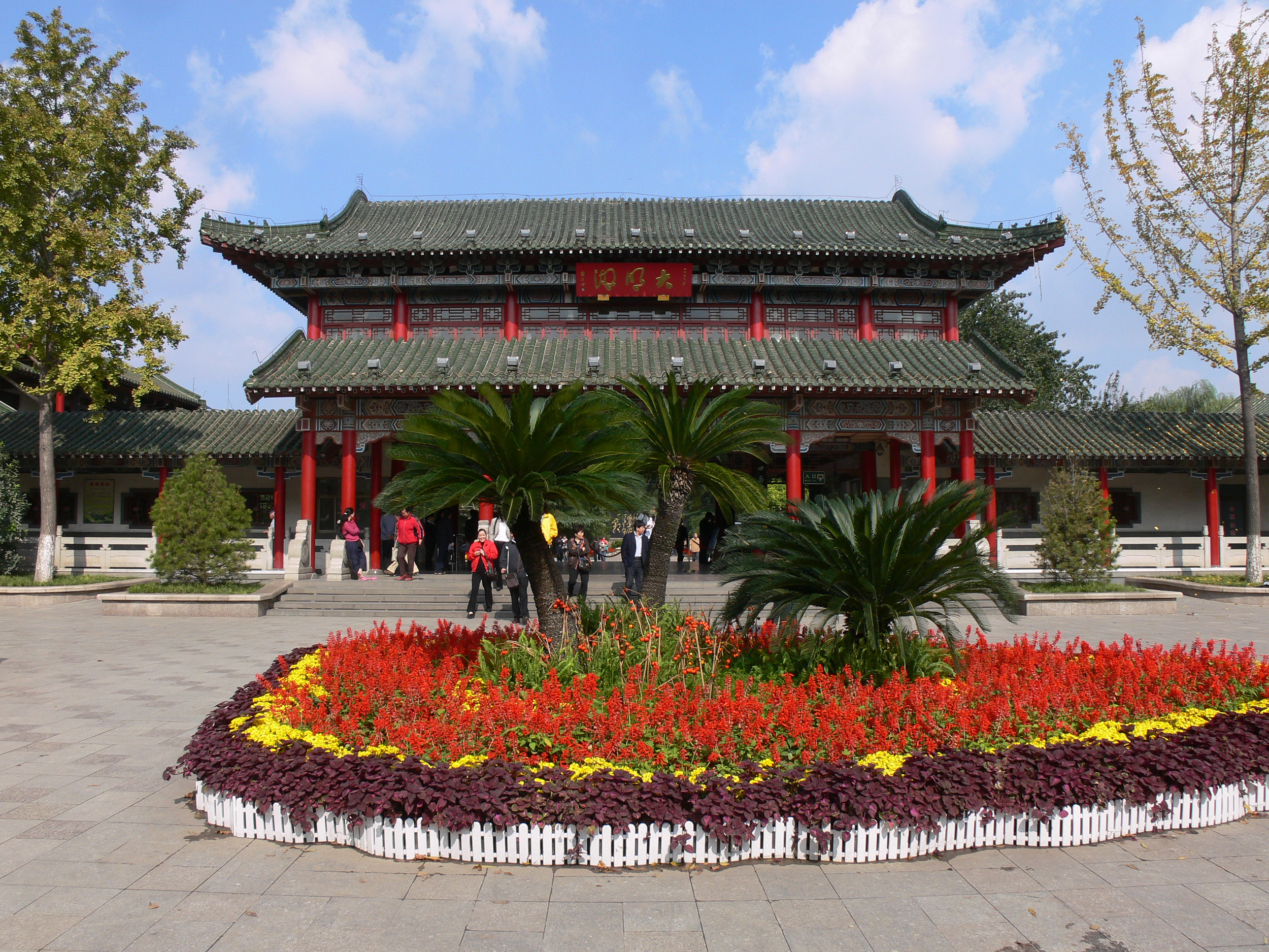 济南大明湖公园雨荷厅